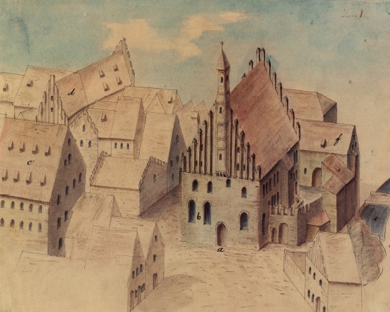 Hohe Schule und Collegium Georgianum 1571 a Collegium vetus, ehemaliges Pfründnerhaus von der Westseite b Saoellum St Catharienae c Collegium novum seu Georgianum d Peter und Paul Kichlein e Wohnung des Hohen-Schulkastners f Substituts-Wohnung g Laboratorium h Fluss Schutter